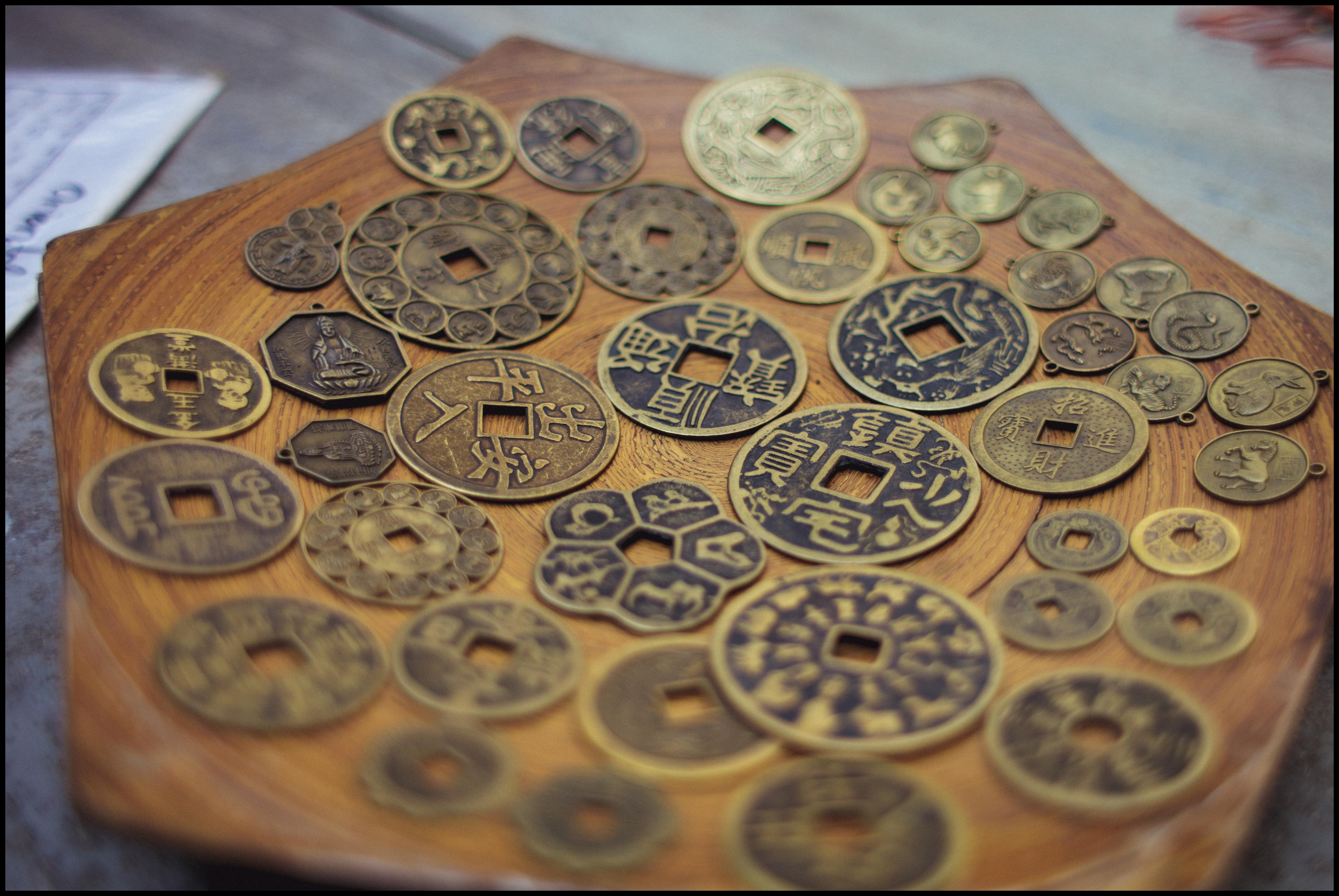 Hội An, Vietnam